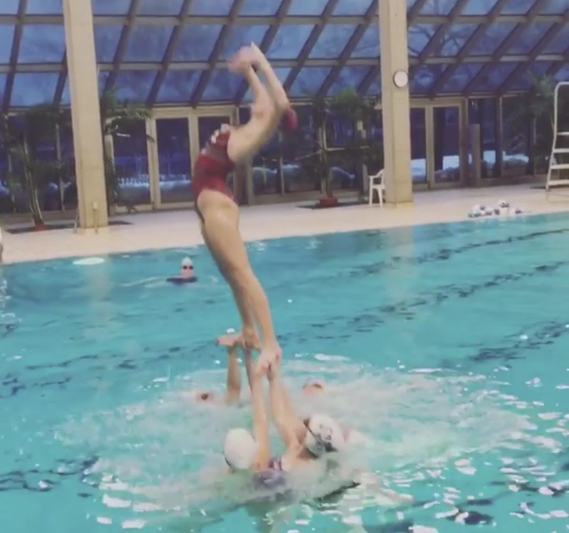 Les nageuses exécutent une poussée acrobatique. En d'autres mots, elles propulsent une autre nageuse hors de l'eau afin qu'elle puisse accomplir un mouvement ou une position.